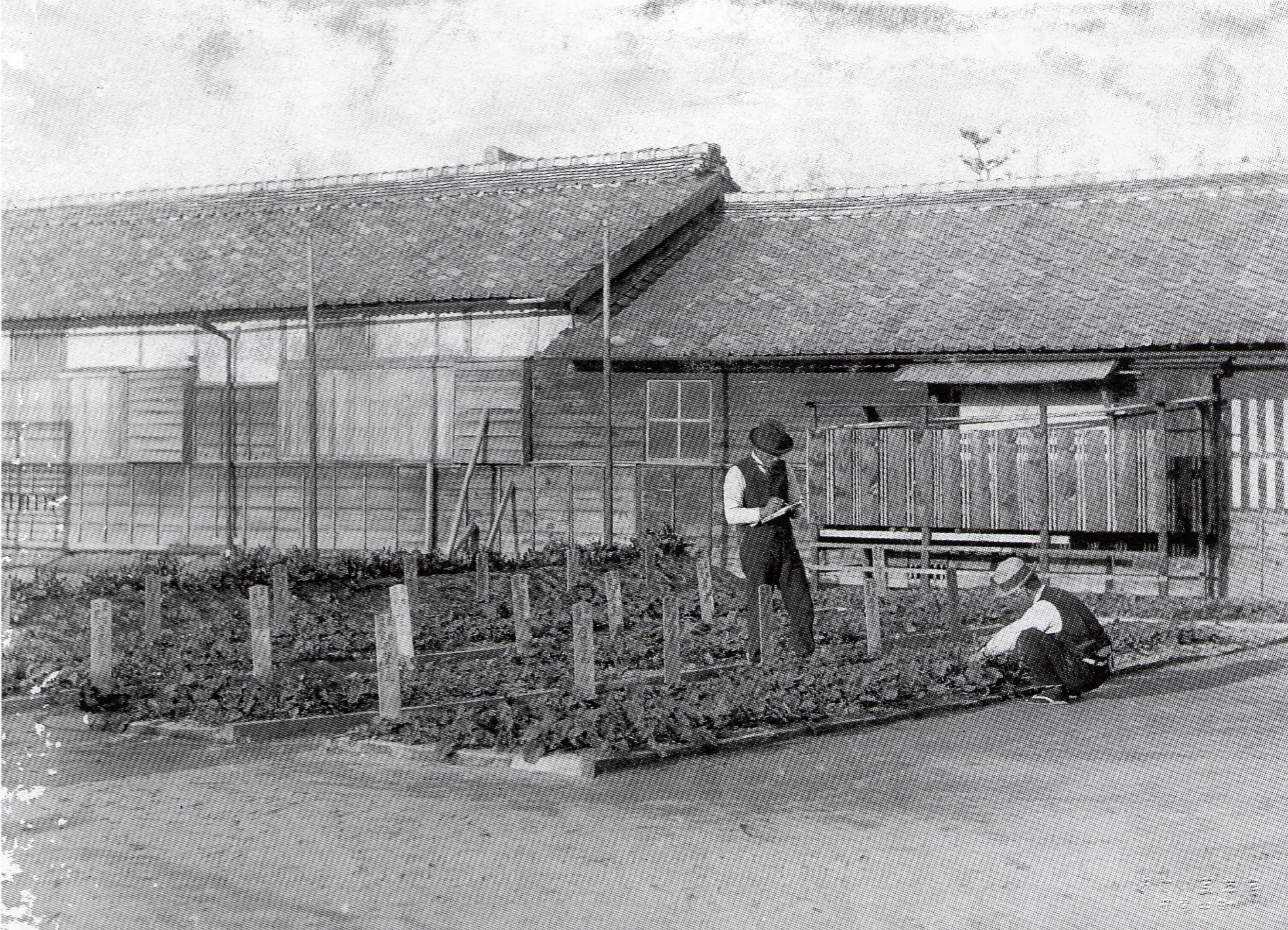 愛知県岡崎市における菜種の育苗。1927年。